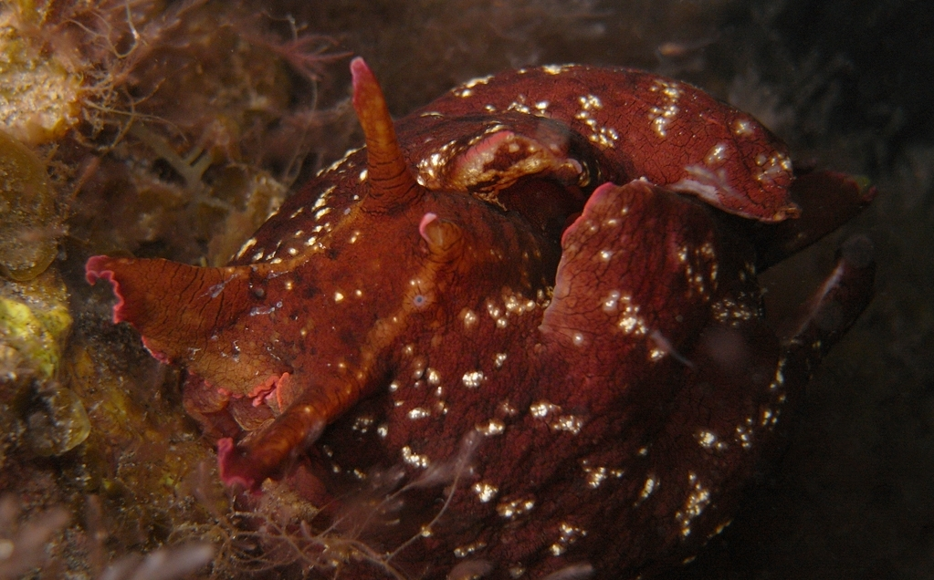 Aplysia punctata, Hierro, La Restinga, Islas Canarias, España